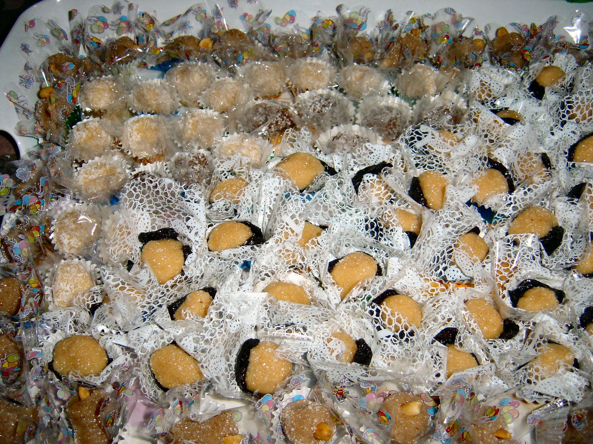 Quem não compreende um olhar...